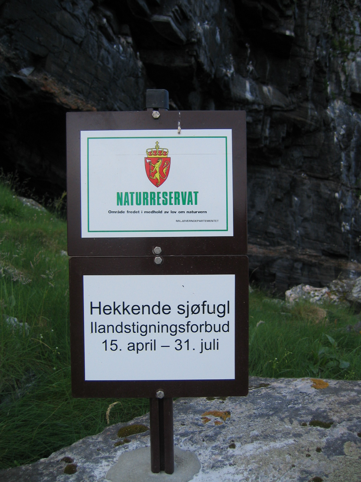 Sign posted by the Måstadfjellet landskapsvernområde on the island Værøy